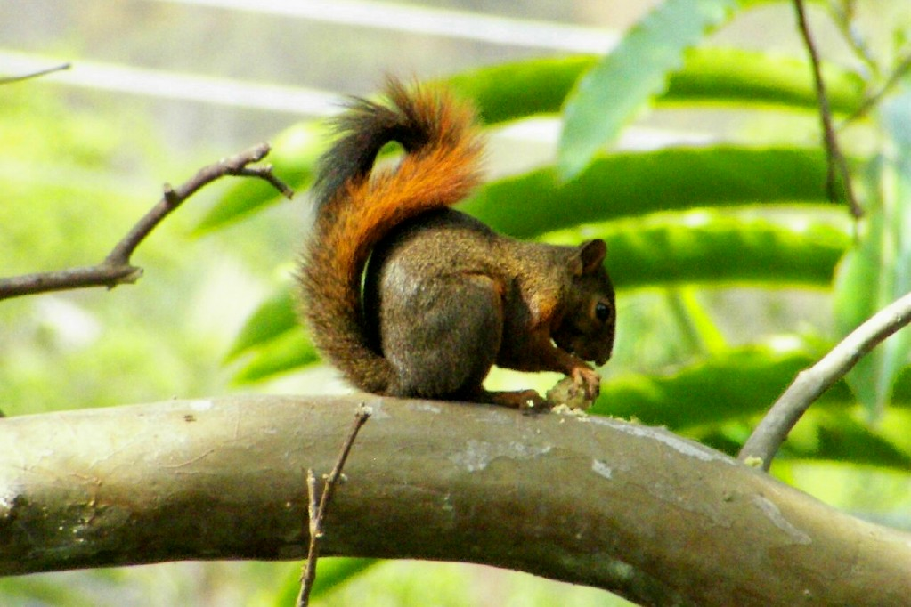 Especie de ardilla del género Sciurus, Henri Pittier, Venezuela.